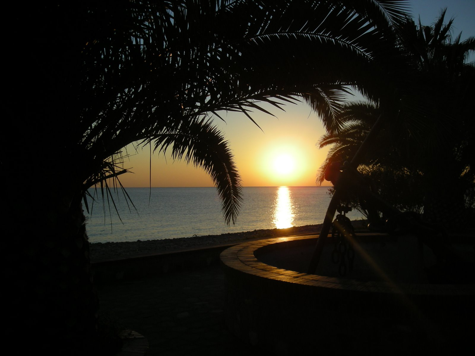 Ancora All'Alba